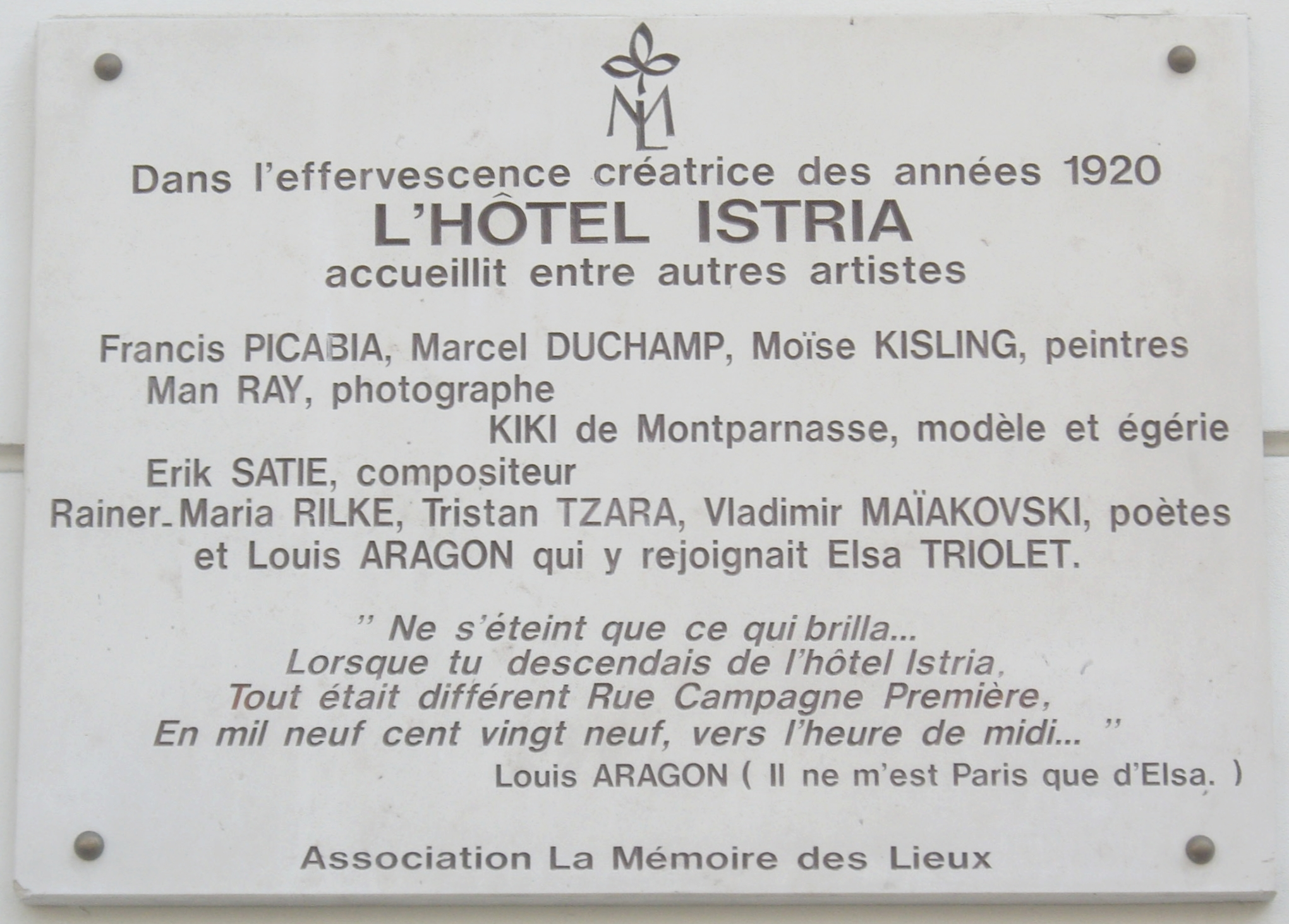 Plaque commémorative, 29 rue Campagne-Première, Paris 14e. « Dans l'effervescence créatrice des années 1920, l'hôtel Istria accueillit, entre autres artistes, Francis Picabia, Marcel Duchamp, Moïse Kisling, peintres, Man Ray, photographe, Kiki de Montparnasse, modèle et égérie, Erik Satie, compositeur, Rainer Maria Rilke, Tristan Tzara, Vladimir Maïakovski, poètes, et Louis Aragon qui y rejoignait Elsa Triolet. [...] »